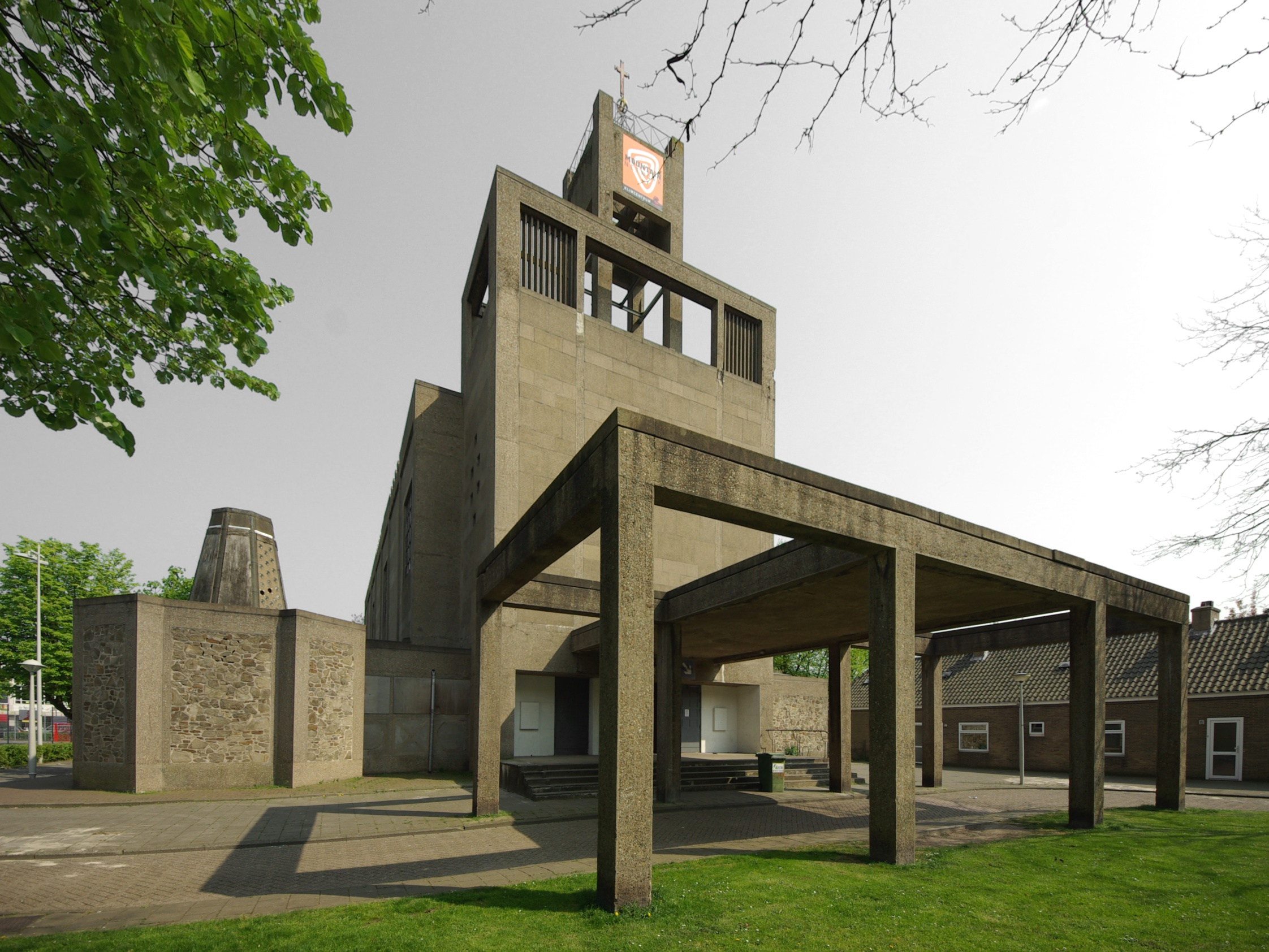 De Sint-Josephkerk aan de Erik de Roodestraat in Amsterdam Bos en Lommer is gebouwd in 1950 tot 1952 door de architecten G.H.M. Holt en K.P. Tholens. Het gebouw werd als kerk gebruikt tot 1990. Thans is het in gebruik als klimhal. Na voordracht in 2007 via de lijst van rijksmonumenten uit de periode 1940-1958, opgesteld door Ronald Plasterk, werd de Sint-Josephkerk erkend als rijksmonument. 82″ N, 4° 50′ 41.28″ E